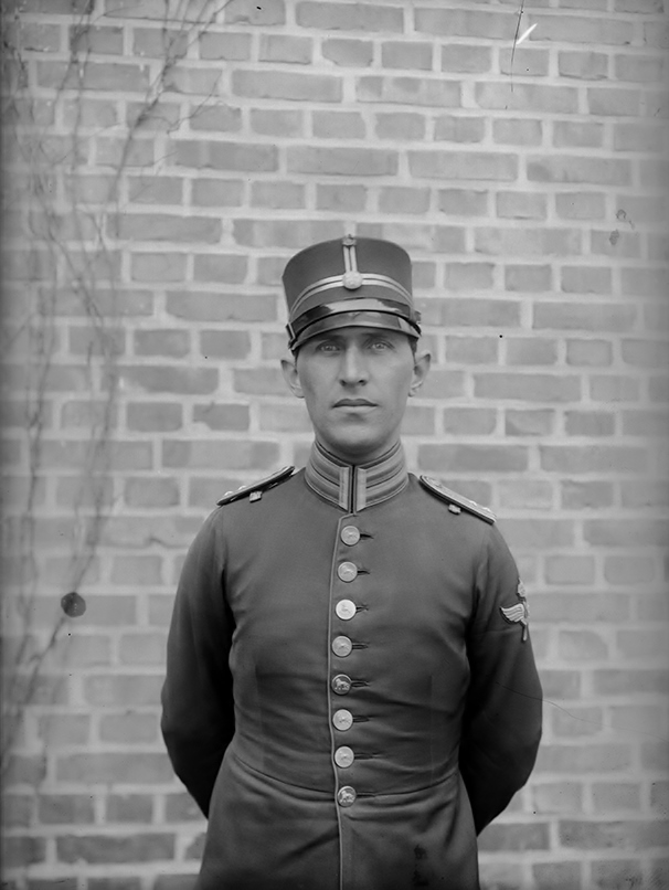 Motiv: Porträtt av löjtnant Magnus Bång, militär flygförare och flygspanare. Tillhör Gamla Malmen-samlingen. GM 1107. Ur Flygvapenmuseums bildarkiv.